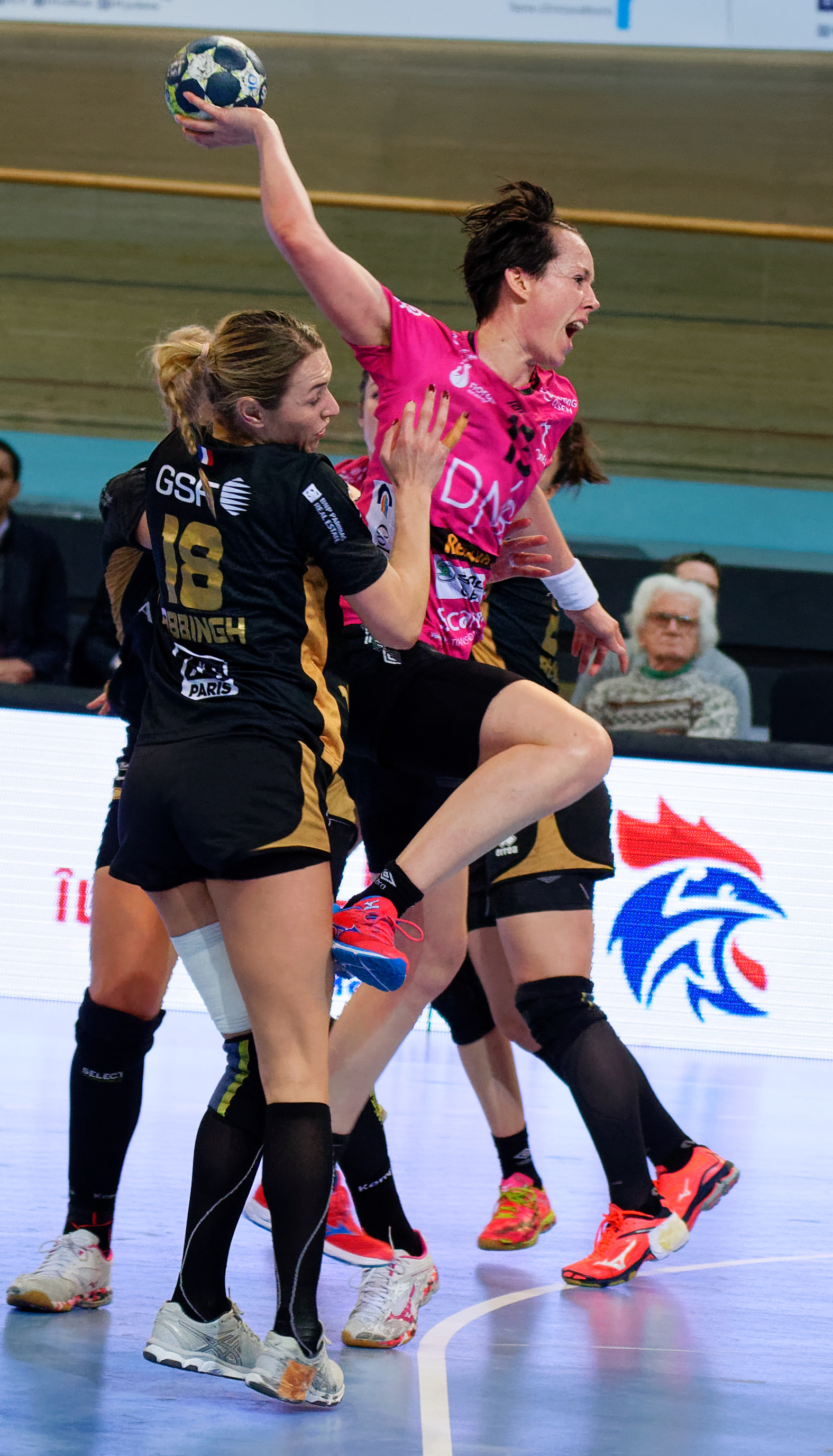 Rencontre du tour principal de coupe EHF entre Issy Paris Hand et les norvégiennes de Vipers Kristiansand au vélodrome de Saint-Quentin en Yvelines, le 03 février 2018.